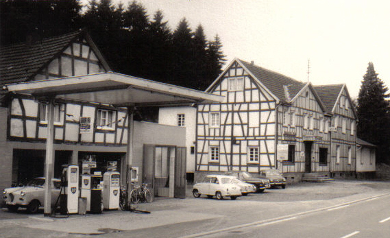 Das Hotel Hammer mit Nebengebäude in den 60er Jahren, damals zugehörig zur Ortschaft Herchen-Bahnhof, Gemeinde Herchen